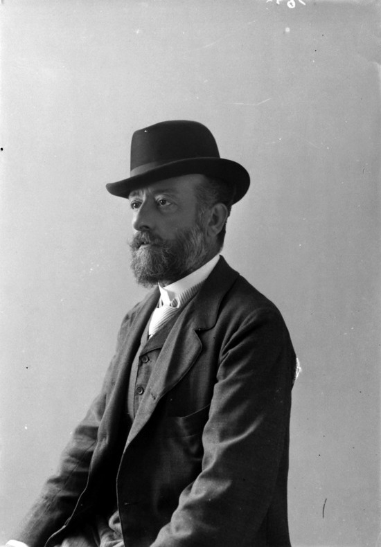 fotografato da Mario Nunes Vais